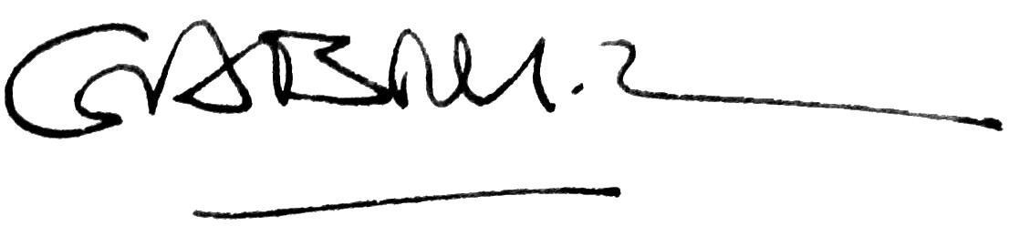 Image of Gabriel Garcia Marquez signature